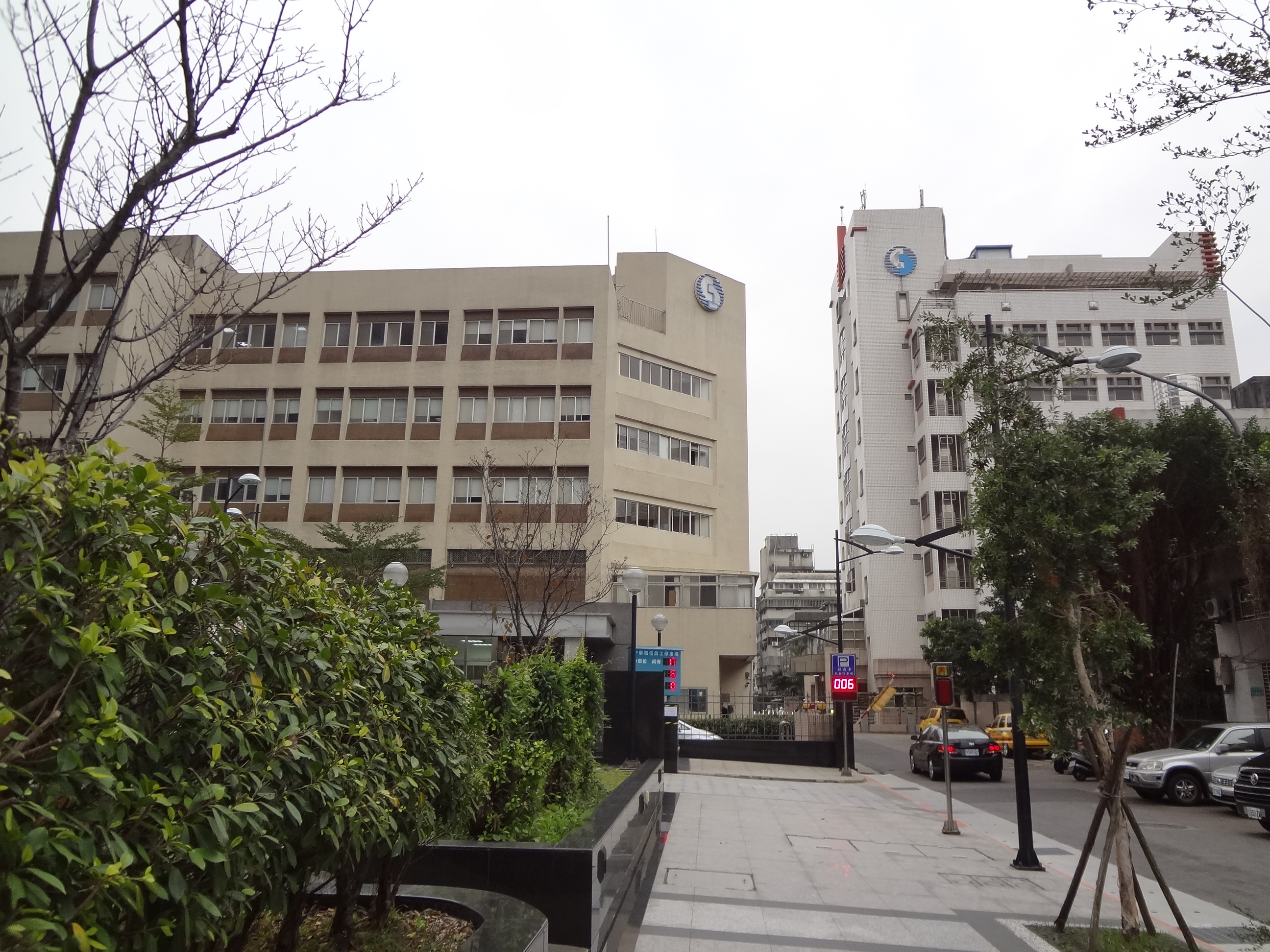 中華電信研究院台北辦公室，位於臺北市大安區信義路四段74巷11號。